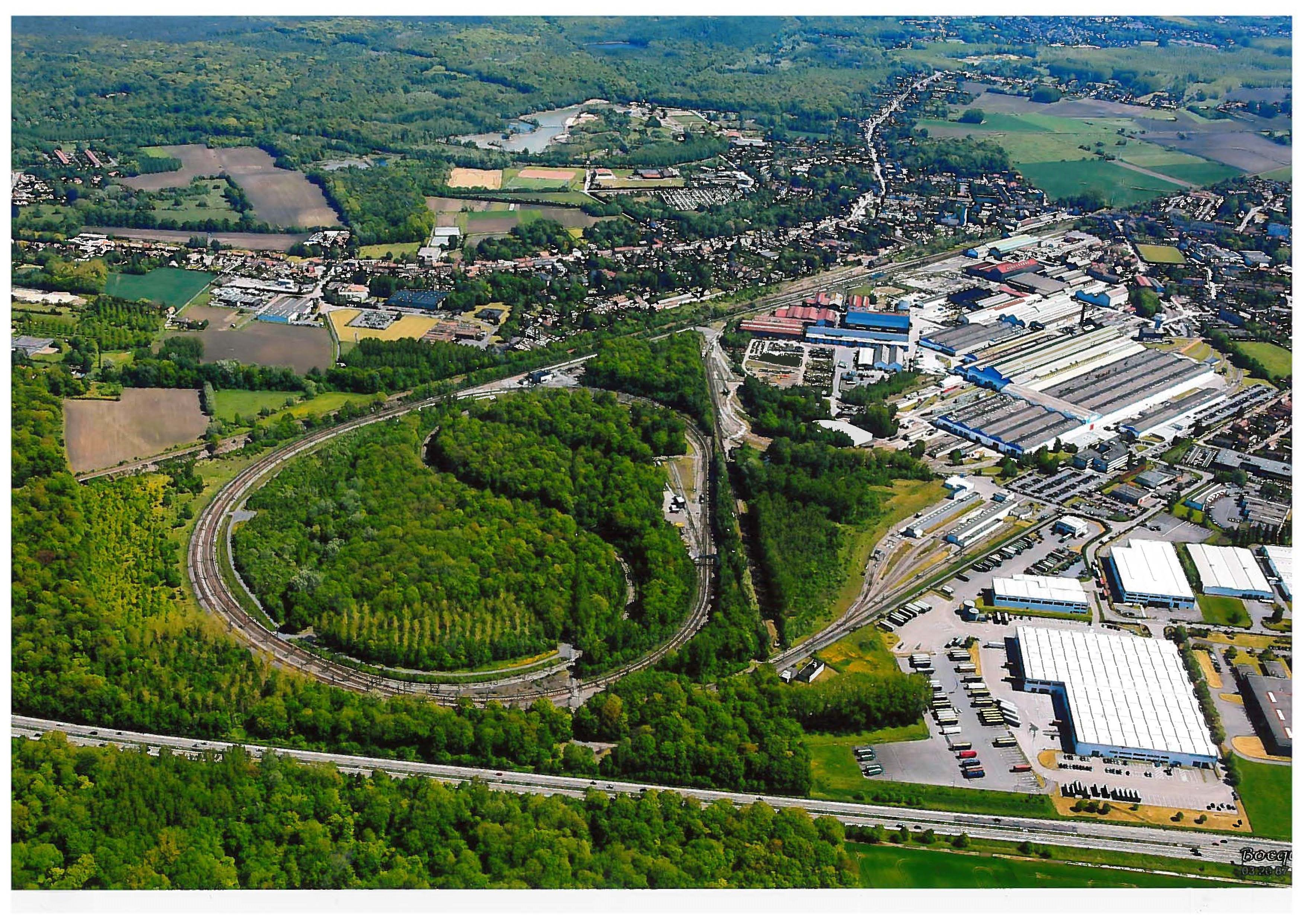 vue aérienne du site